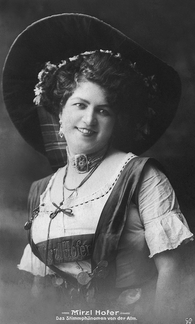 „Mirzl Hofer Das Stimmphänomen von der Alm“